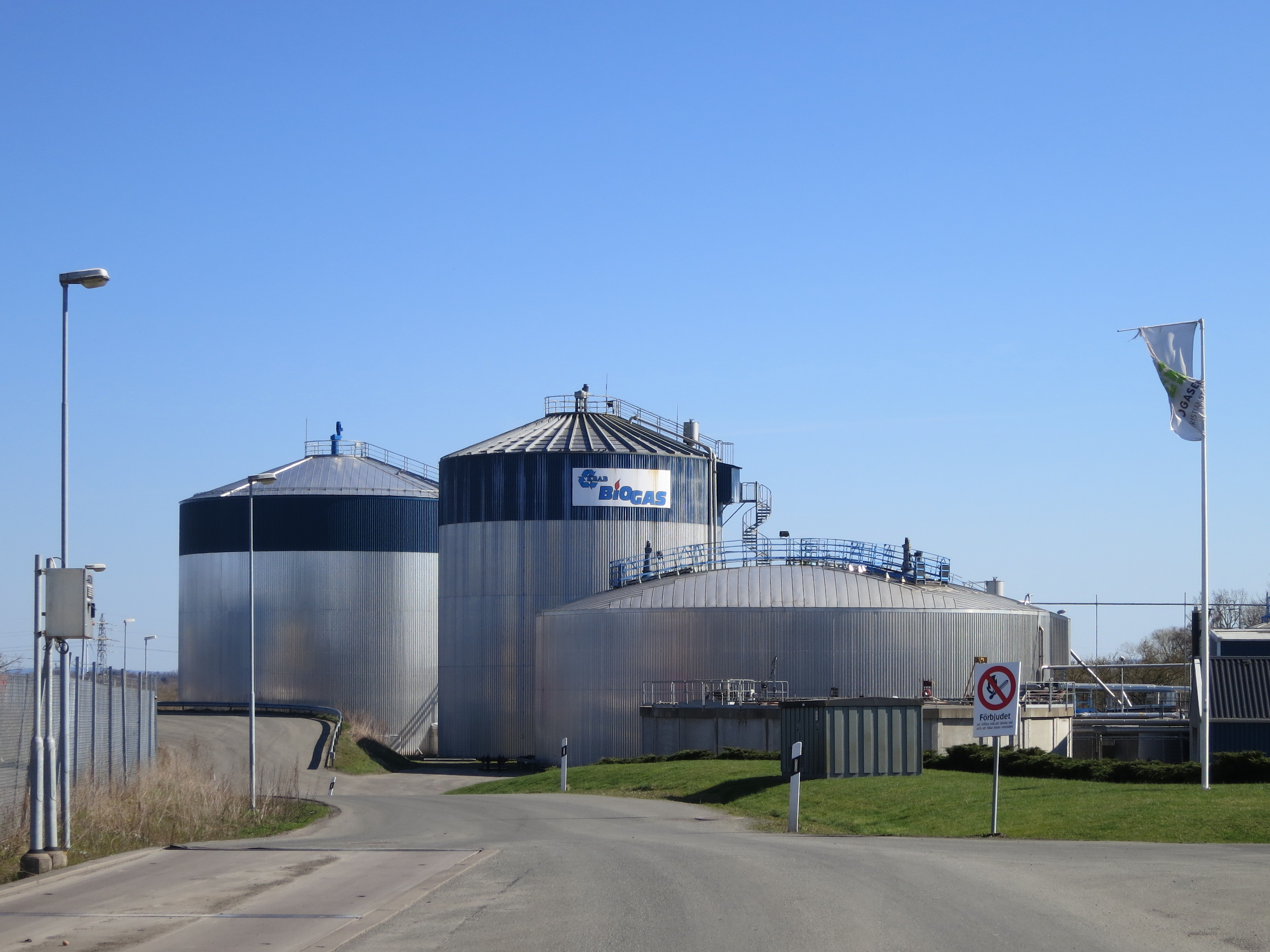 Biogasanläggningen på före detta sockerbruket i Karpalund